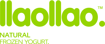 Logotipo de Llaollao